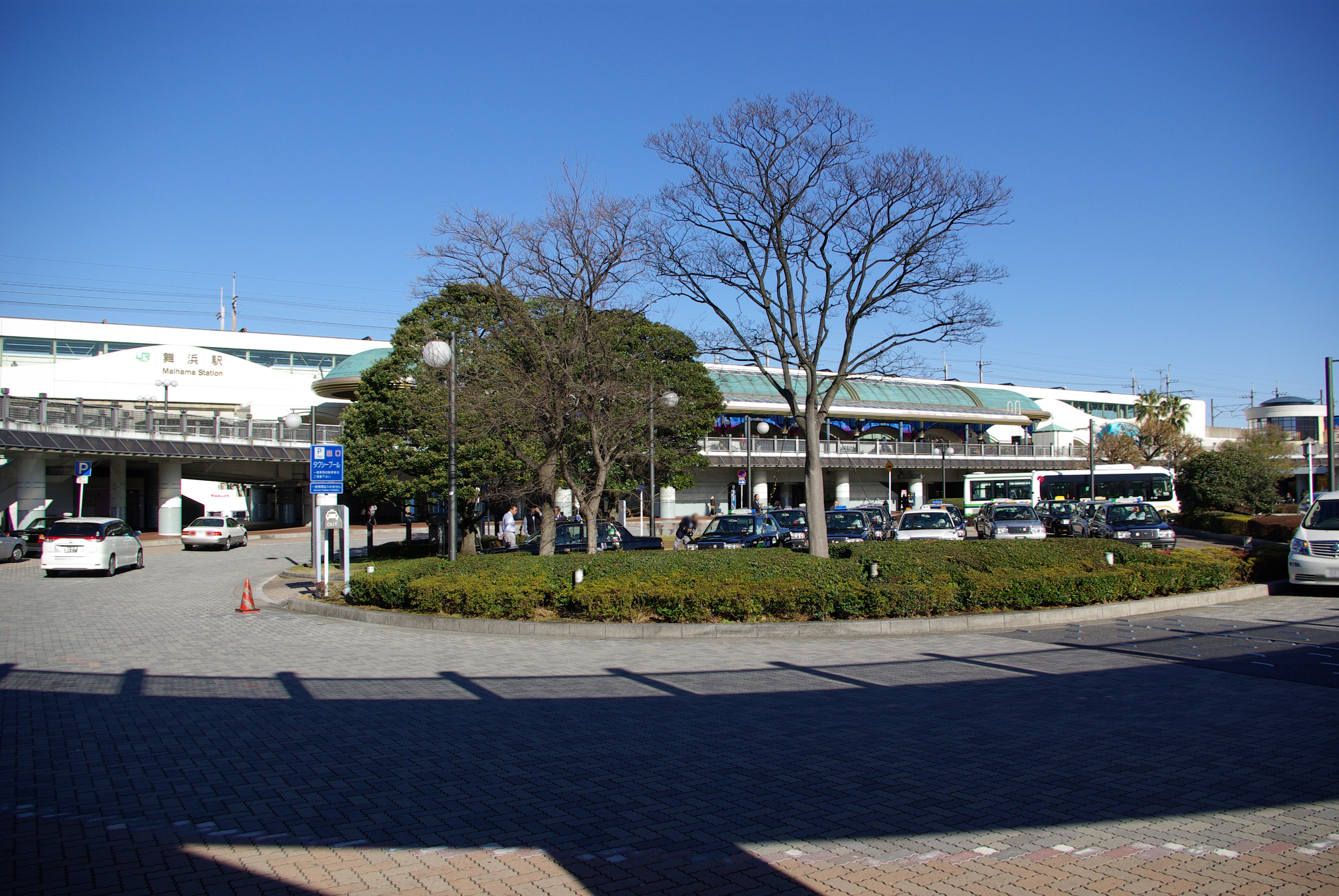 JR京葉線舞浜駅（交通広場から撮影）